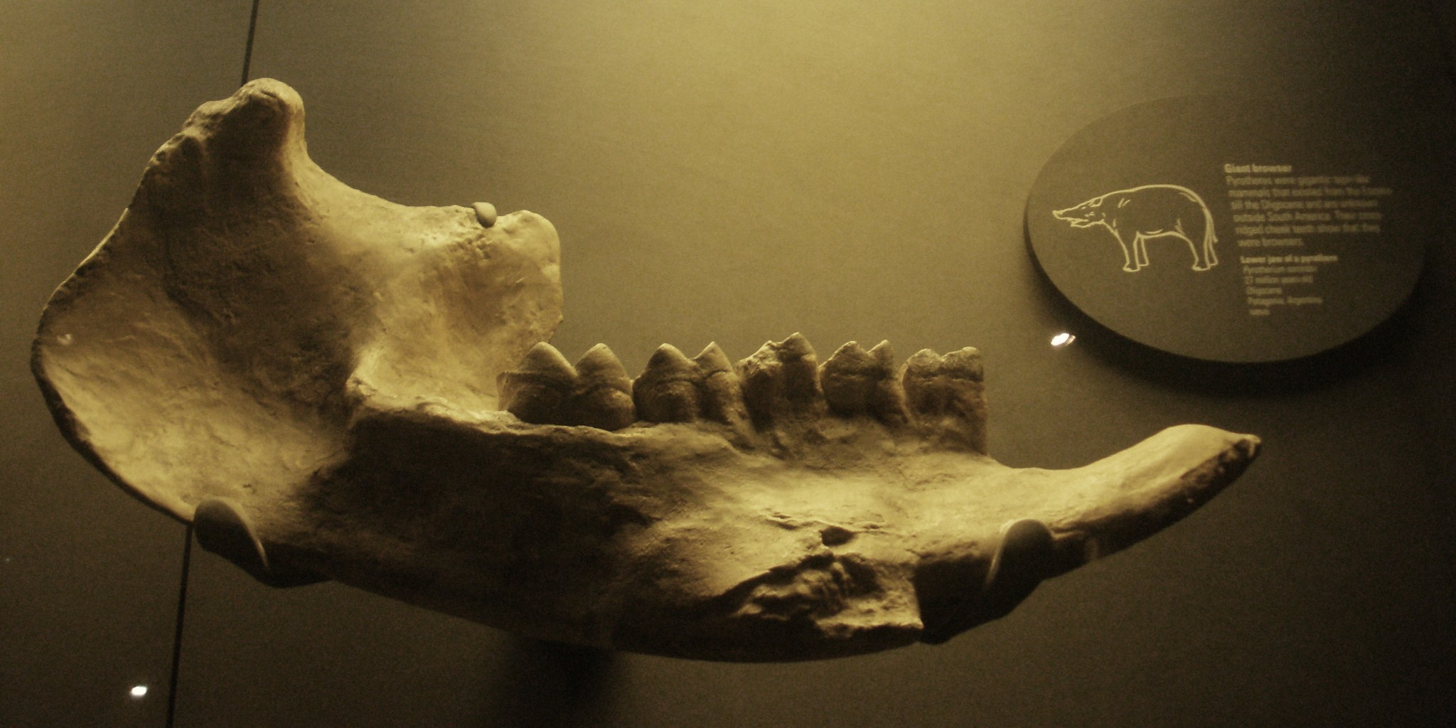 Fossil of Pyrotherium, an extinct mammal-- Took the photo at Natural History Museum, London